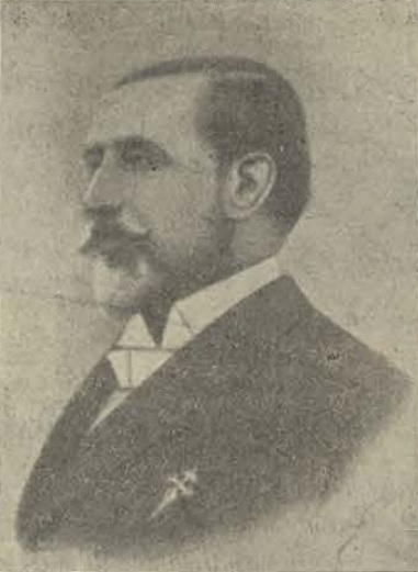 José de Oriol y Gordo Sáez (-1899)